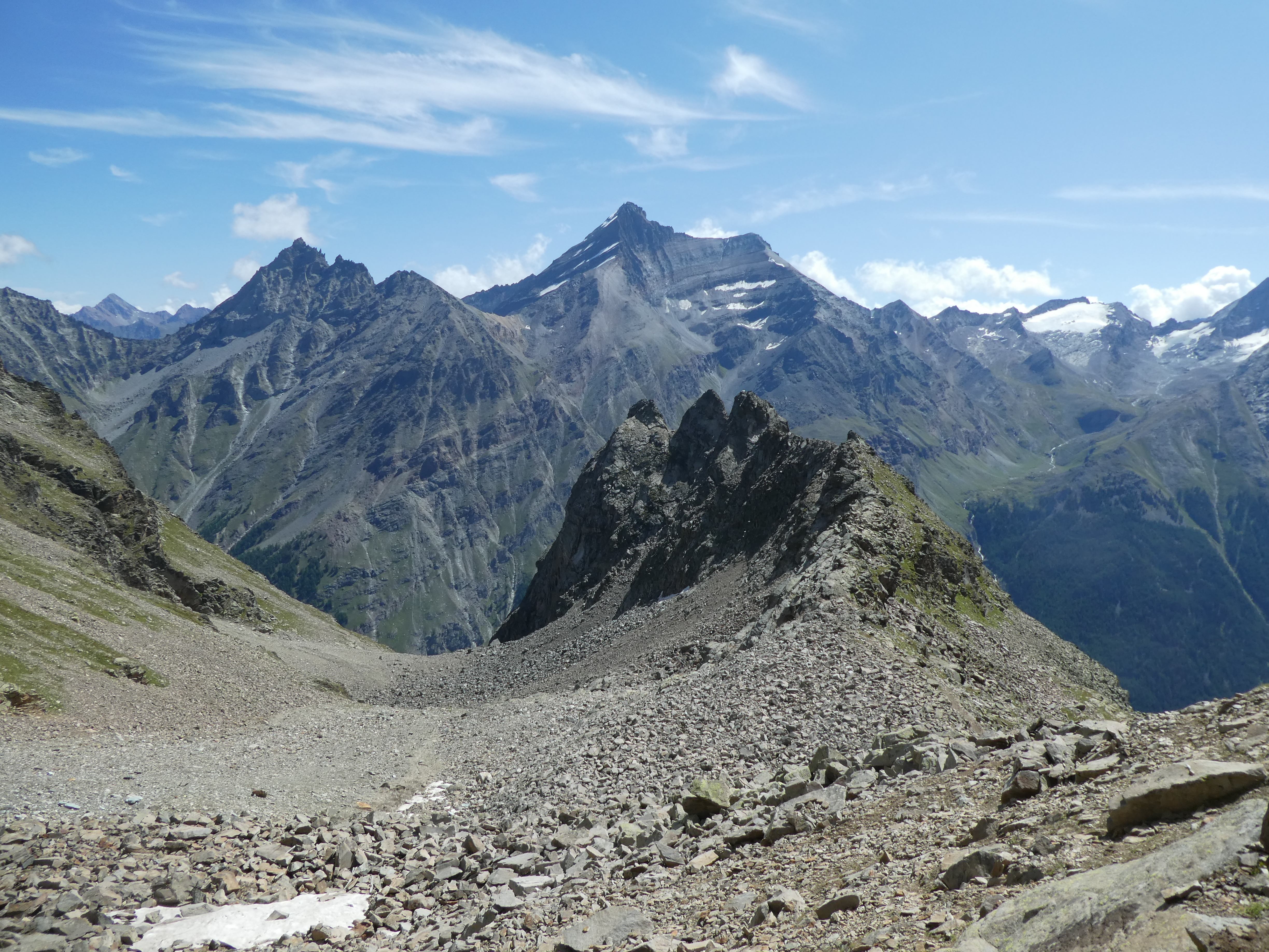 La Grivola al centro; il Grand Nomenon a sinistra; a destra la Gran Serra con il ghiacciaio del Timorion. Fotografia ripresa salendo alla Punta di Bioula.